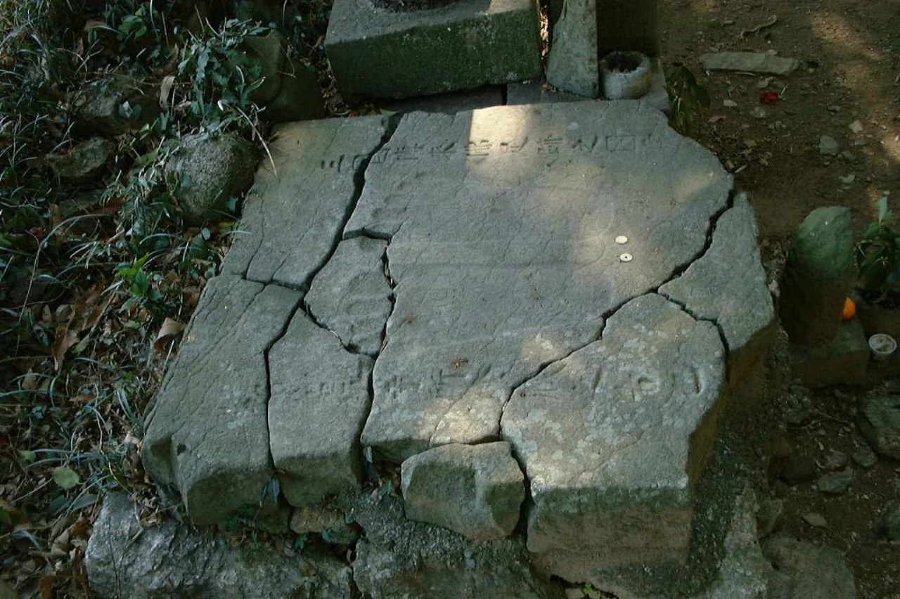 釈迦庵の仏足石